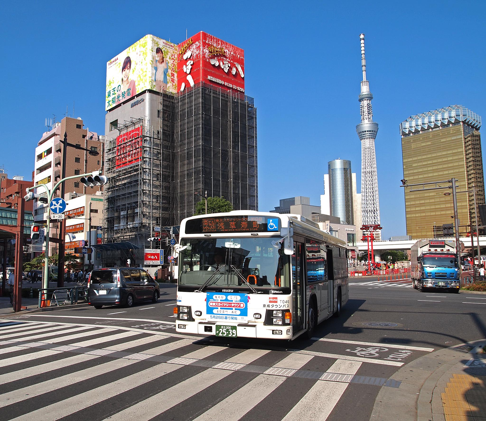 新小岩とスカイツリータウン・浅草を結ぶ京成タウンバス新小59系統。開設当初は新小岩駅からスカイツリータウンまでノンストップで、 タウンバスは大型車で運行していた。 登録番号：足立200か2539 撮影地：東京都台東区、吾妻橋交差点